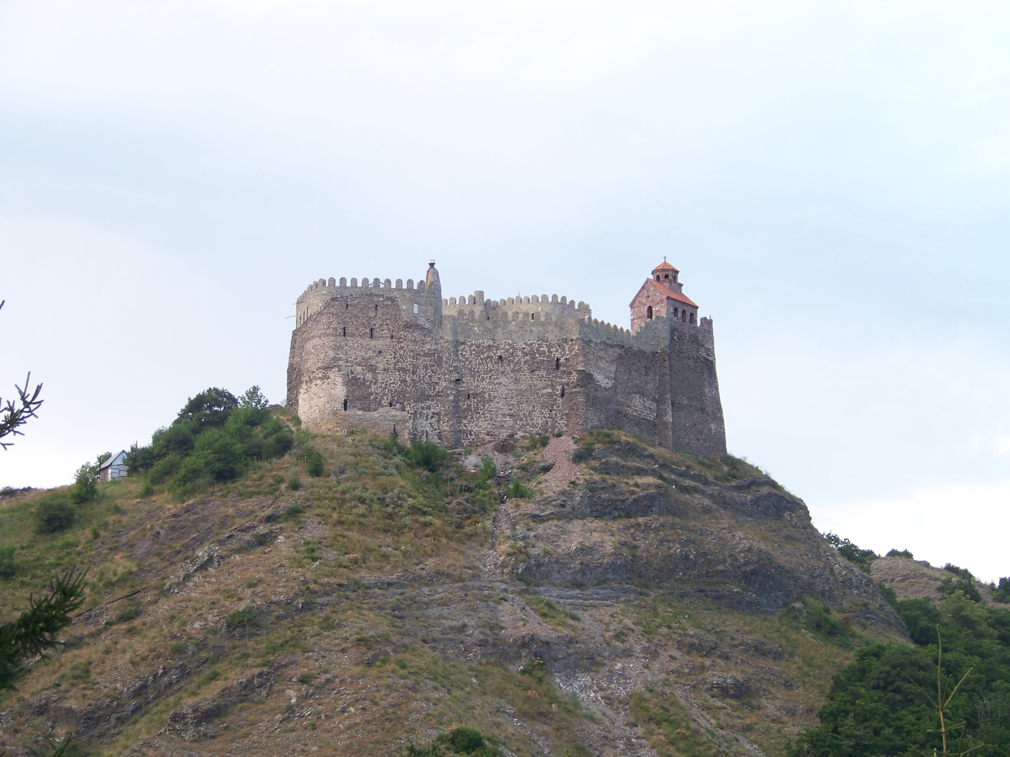 მძოვრეთის ციხე, გალავანი, დარბაზული ეკლესია, სამრეკლო, კოშკი, საცხოვრებელი სახლი